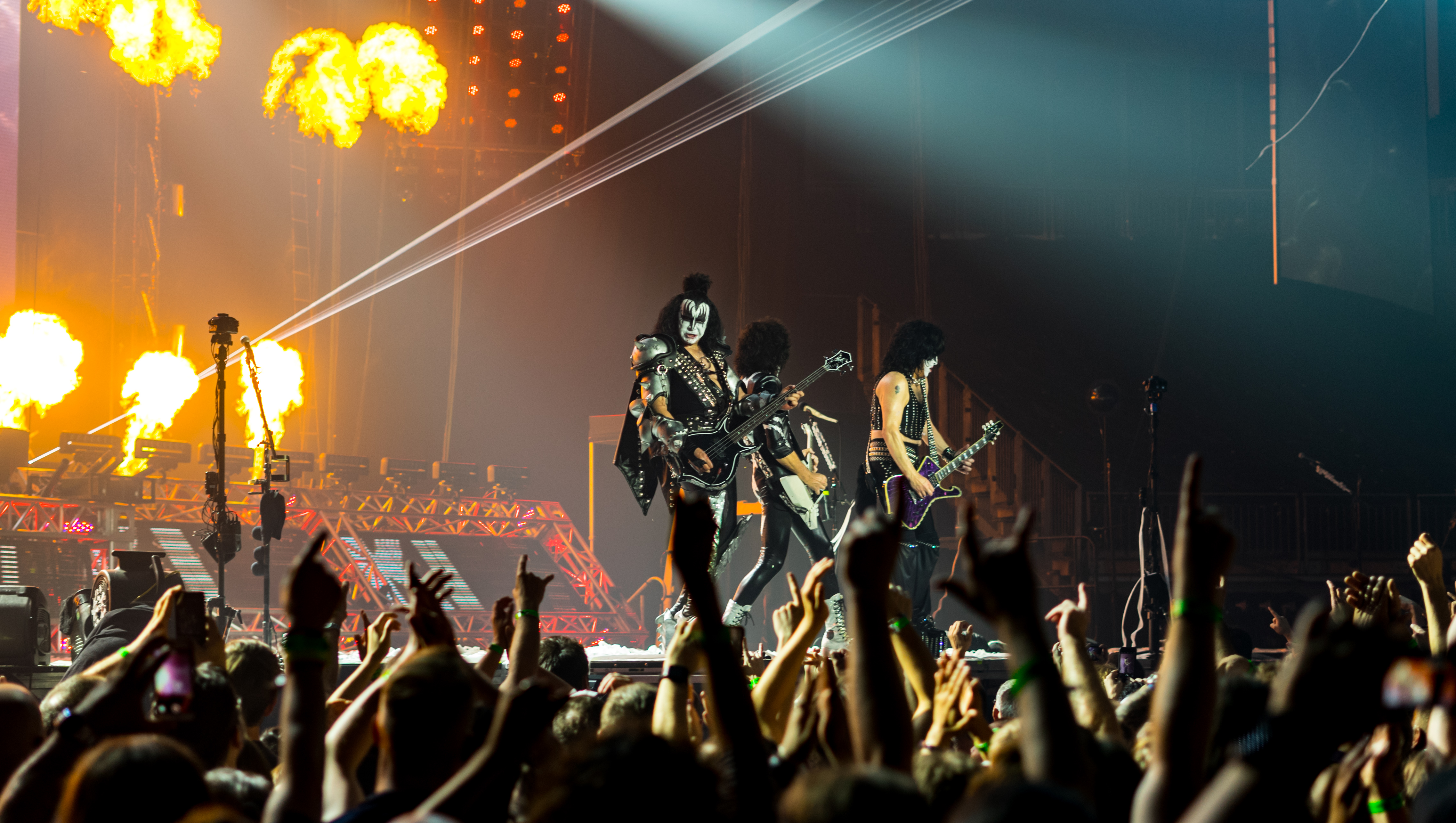 KissO2310517-50